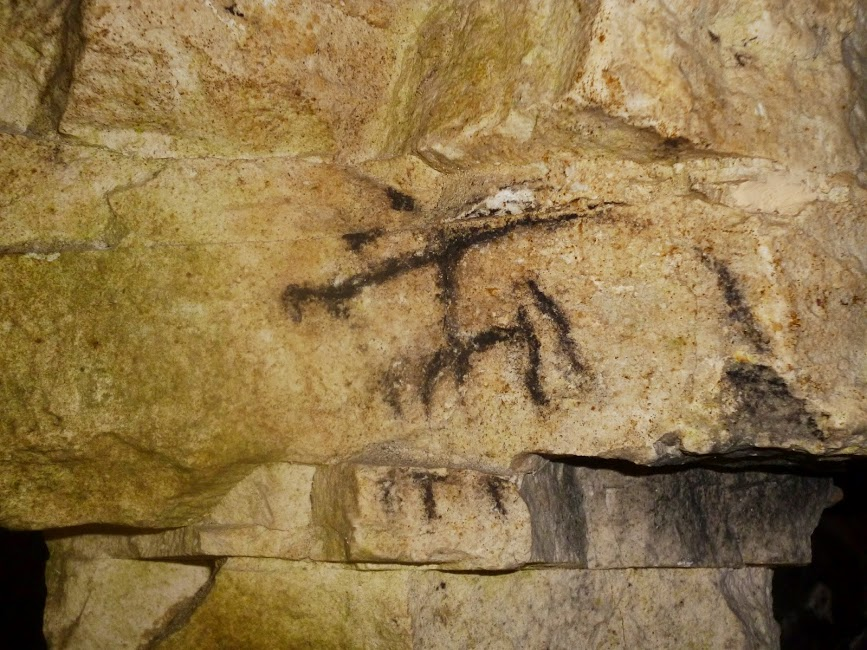 powiat ostrowiecki, Krzemionki Wikidata has entry Q1434086 with data related to this item.